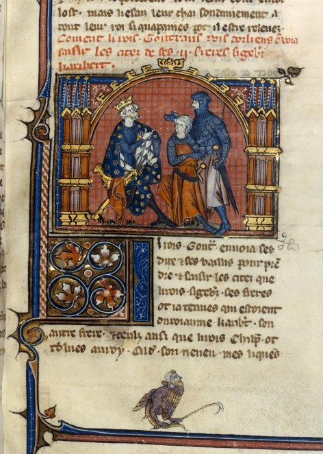 Maître de Fauvel. Saint Gontran et des soldats (1316 ?-1321 ?). Grandes Chroniques de France. - Paris. Français 2615, folio 40.